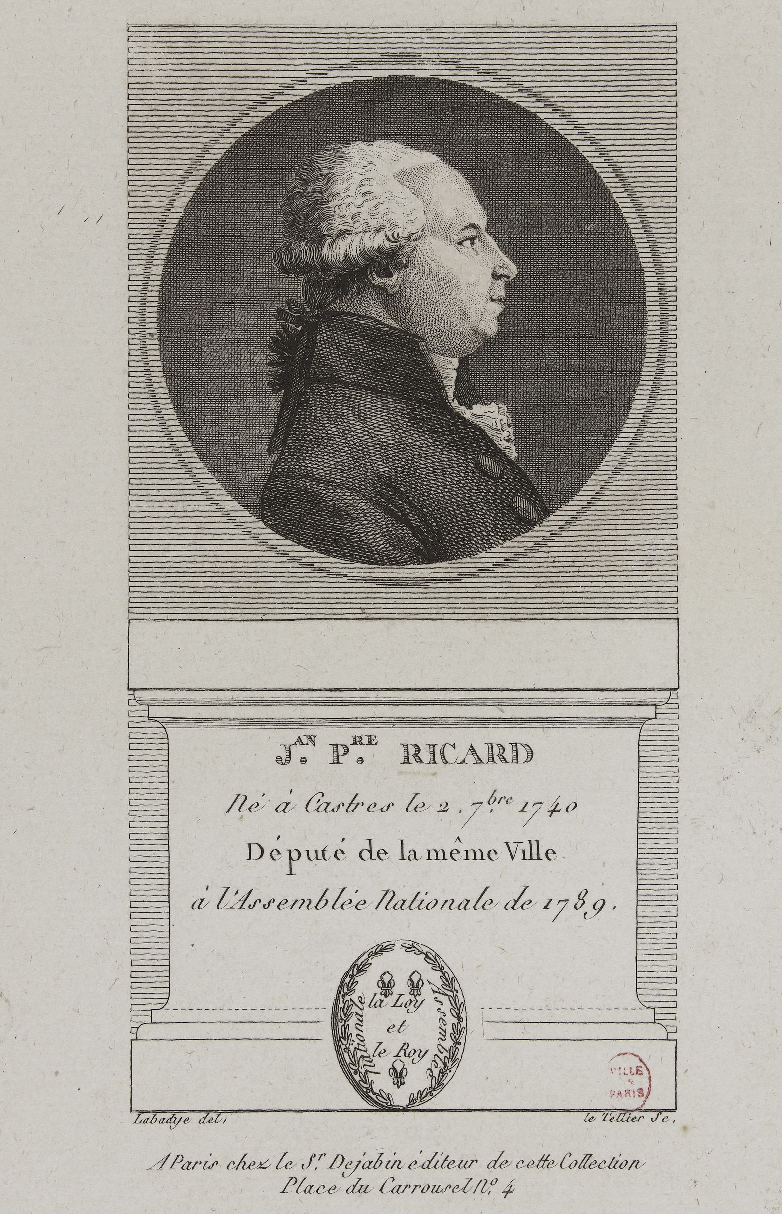 Le député français aux états-généraux de 1789, Jean-Pierre Ricard